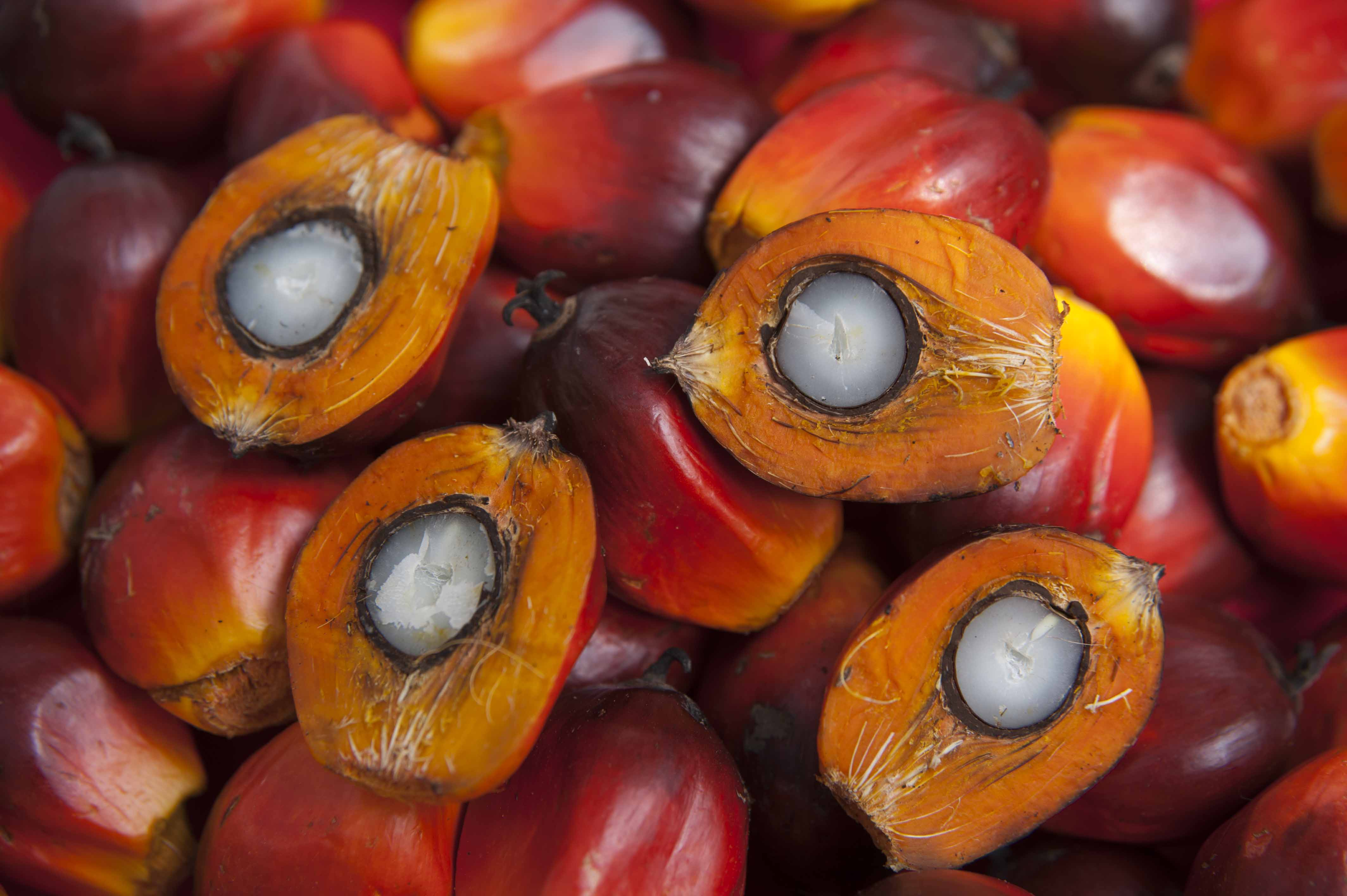 Плодовая кисть содержит 600—800 плодов, общая масса плодовой кисти 10—30 кг. В год на одном растении образуется 3—6, иногда до 10 таких кистей.